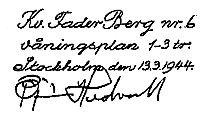 Björn Hedvalls namnteckning på en ritning för Kv. Fader Berg nr. 6 (Klubbacken)